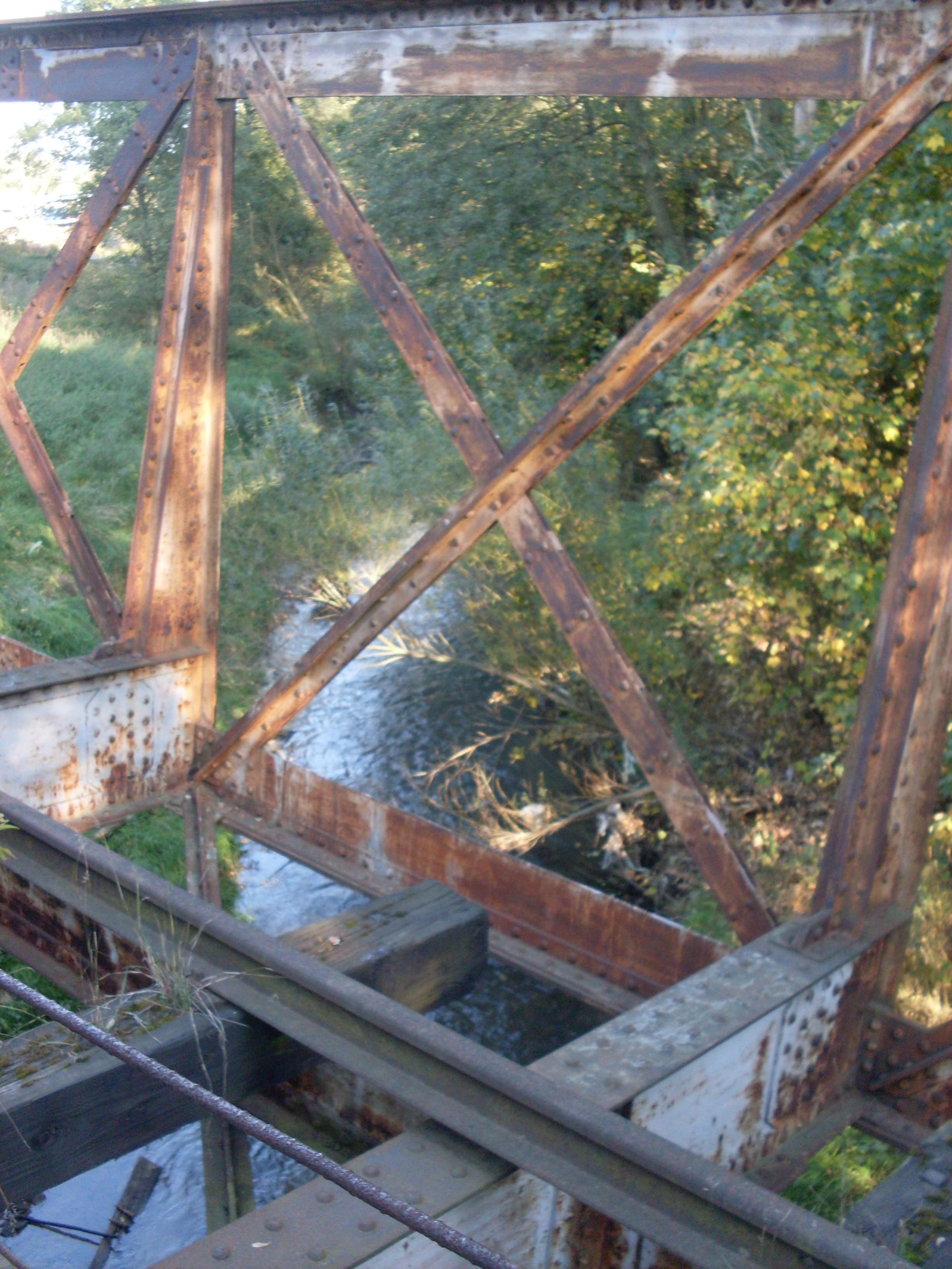 szowice.Gwoździec.Krzeszówka z nieczynnego mostu kolejowego.